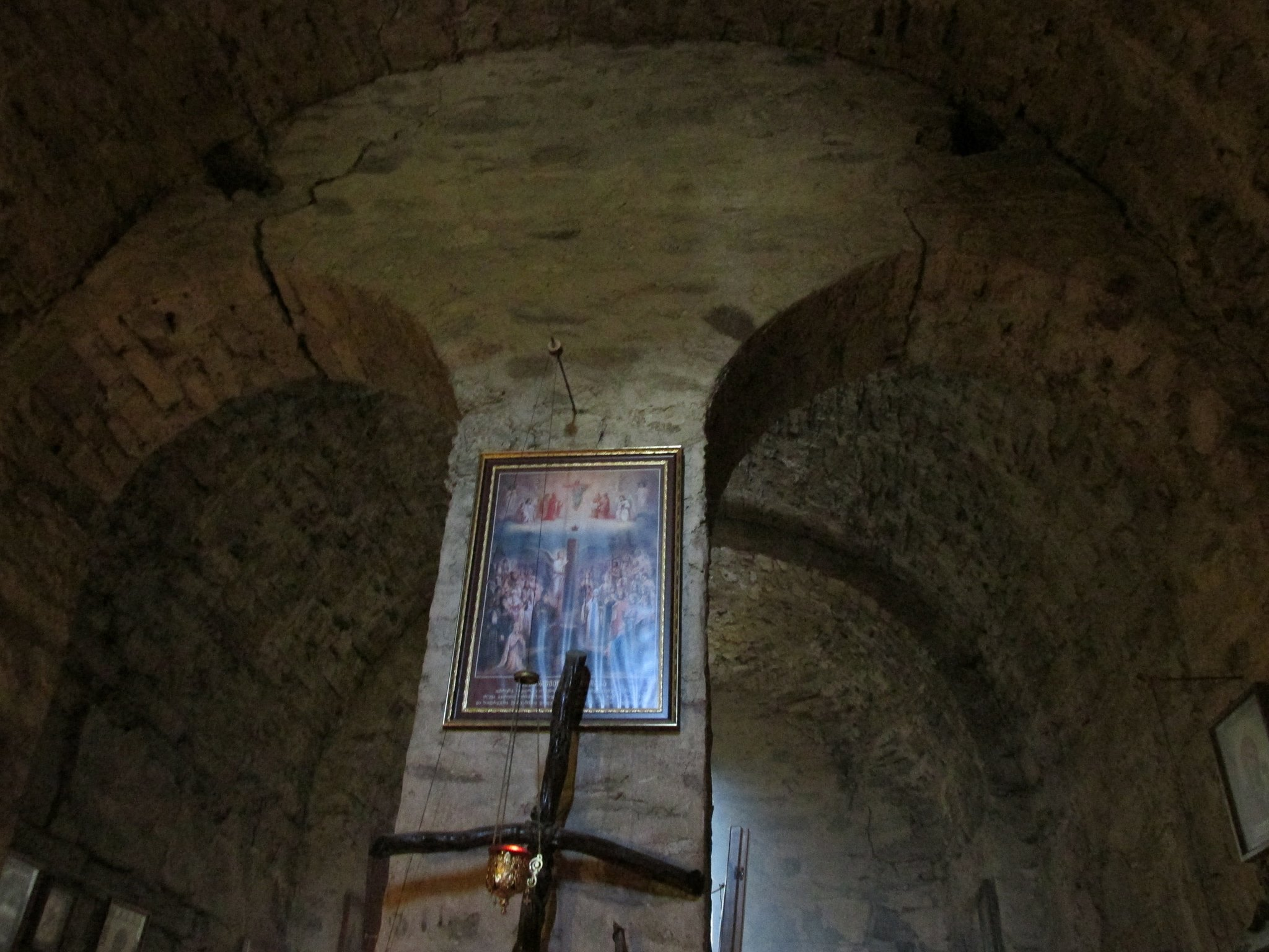 ლომისას ეკლესია